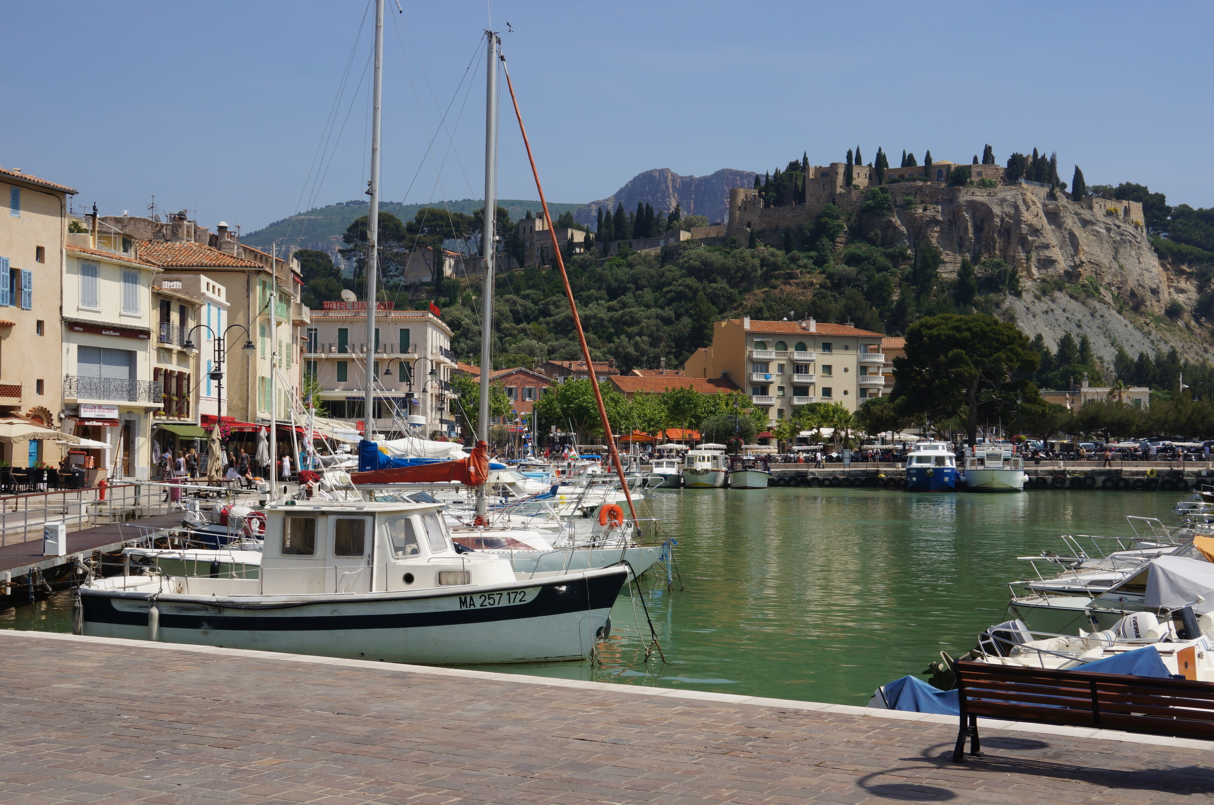 13260 Cassis, France